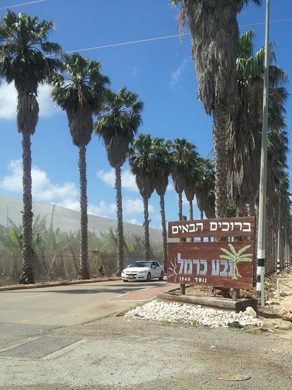 כביש הכניסה ליישוב